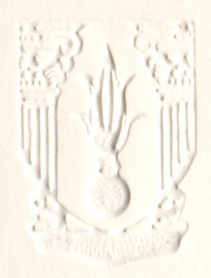 Logo de l'école militaire de Cherchell gaufré sur carton.